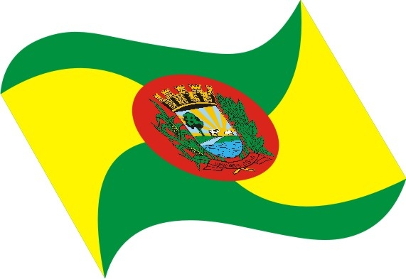 Drapeau de la municipalité de Romelândia - Brésil